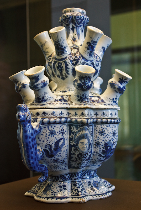 Vitrine Majolica en Delfts aardewerk (Toegepaste kunst en Design, zaal 44) Nederland (Delft) Tulpenvaas, 1700-1800 Aardewerk Schenking: H.P. Pieterse A2807 (KN&V) Netherlands (Delft) Tulip Vase, 1700-1800 Pottery Donation: H.P. Pieterse A2807 (KN & V)